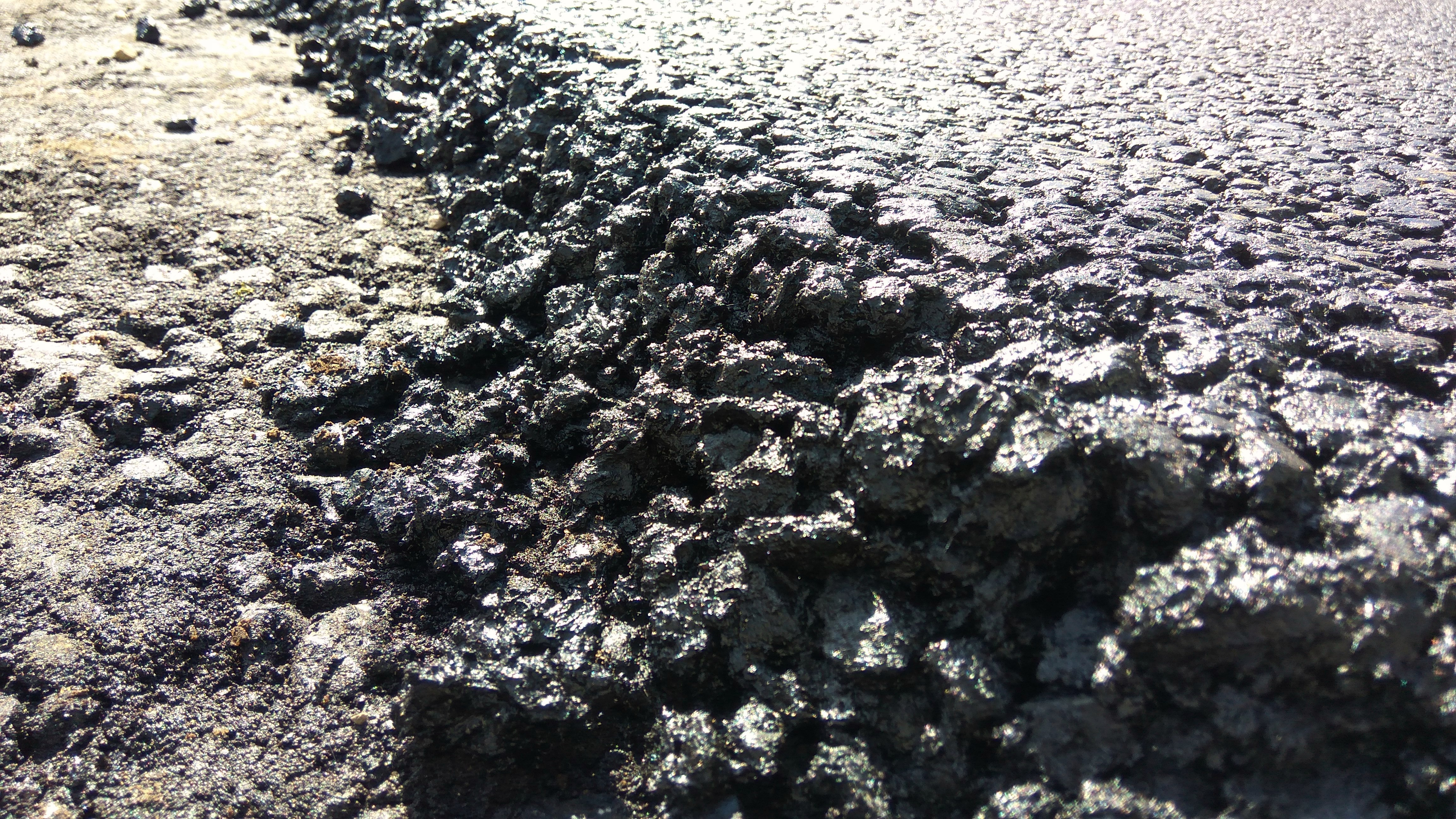 Щебёночно-мастичный асфальт